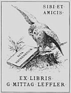 Exlibris für Magnus Gösta Mittag-Leffler